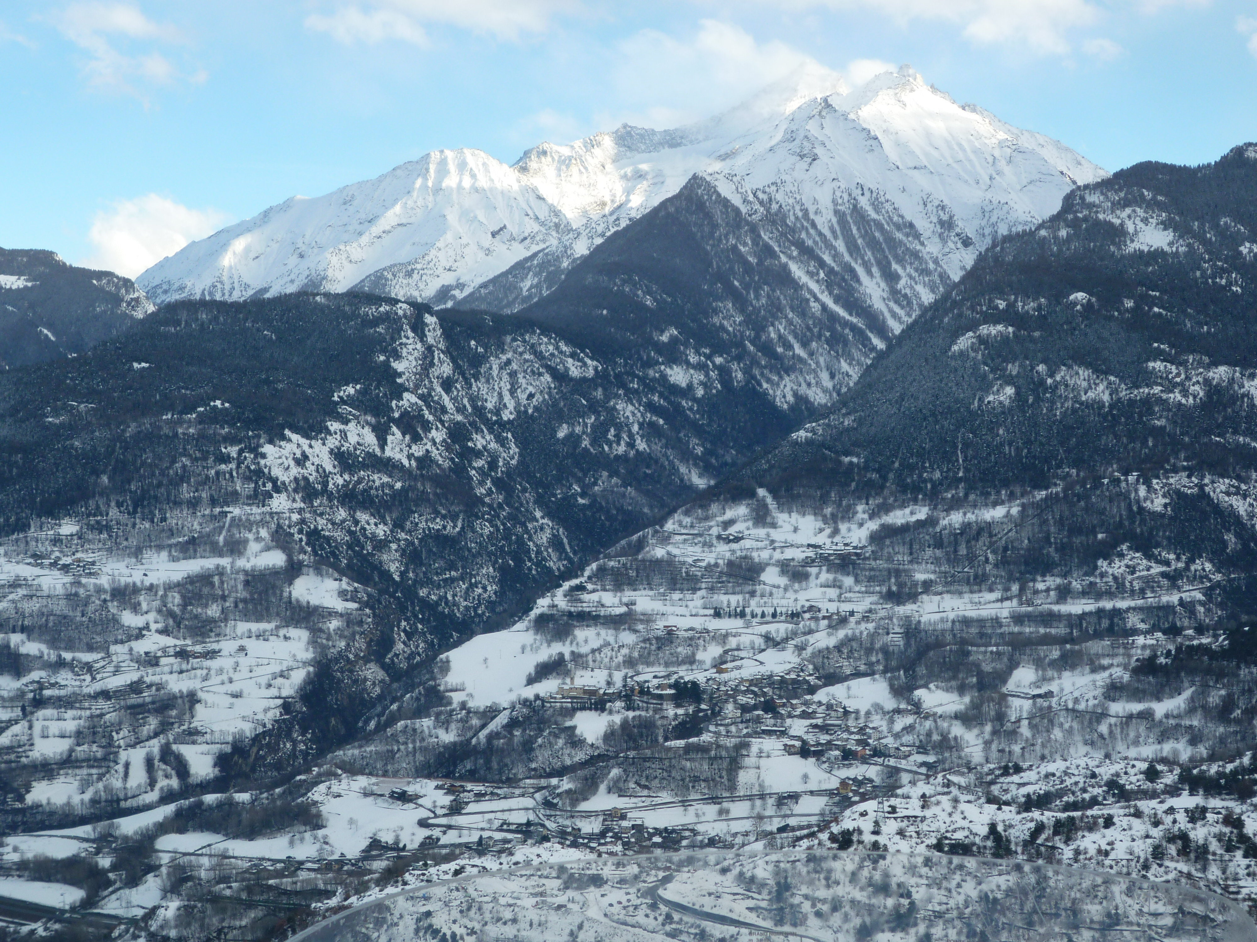 Vue du Valsavarenche de la cure de Saint-Nicolas (Vallée d'Aoste)